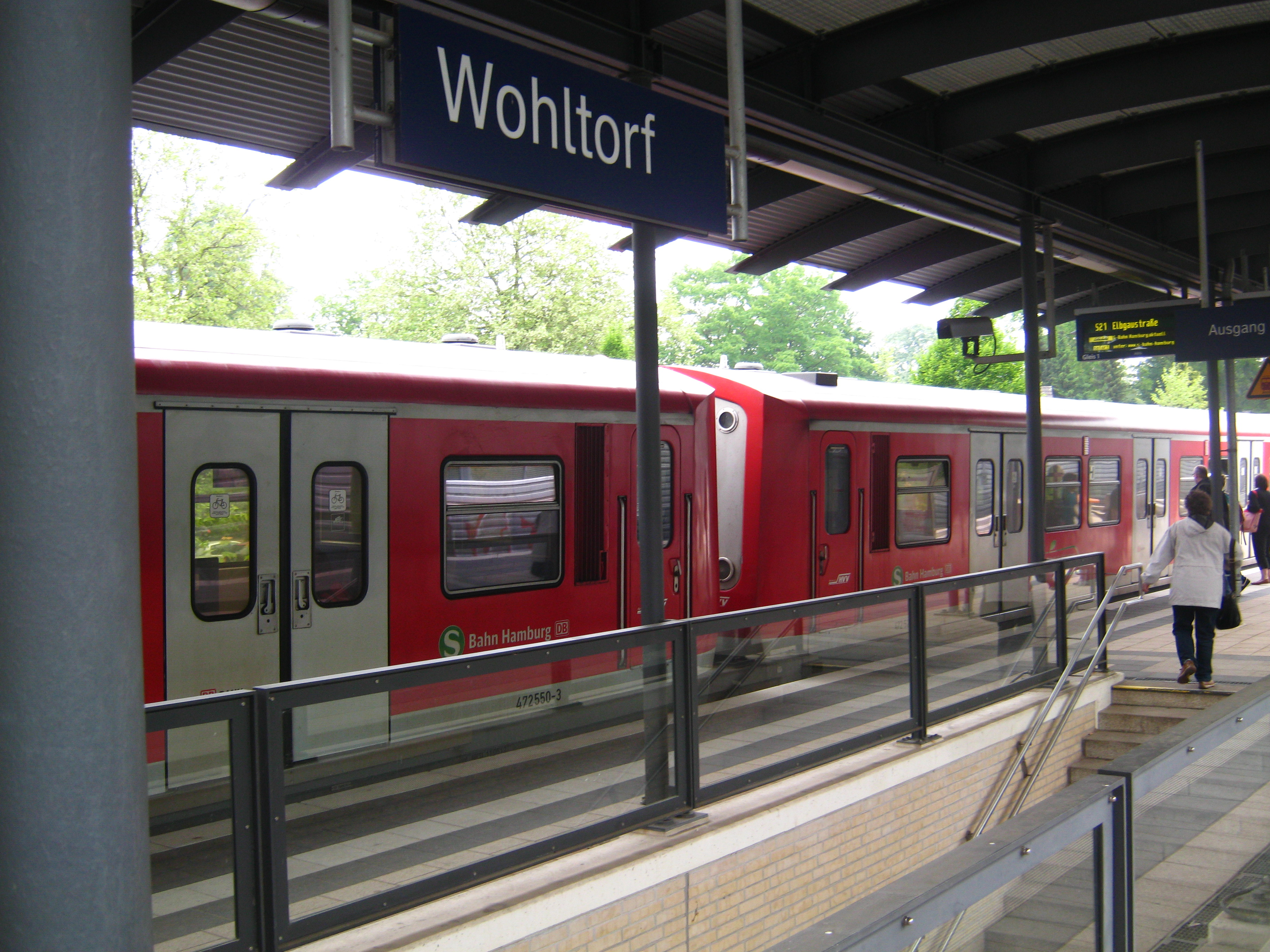 S-Bahn Station Wohltorf.